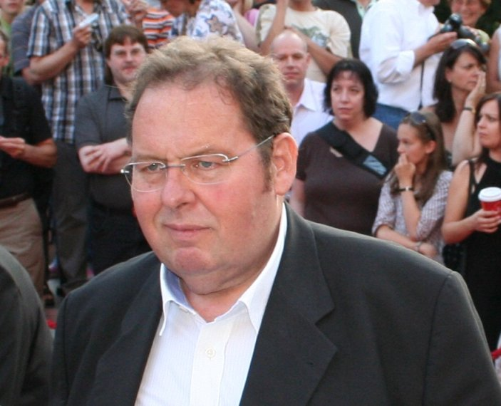 Schauspieler Ottfried Fischer als Besucher bei den Wormser Nibelungenfestspielen